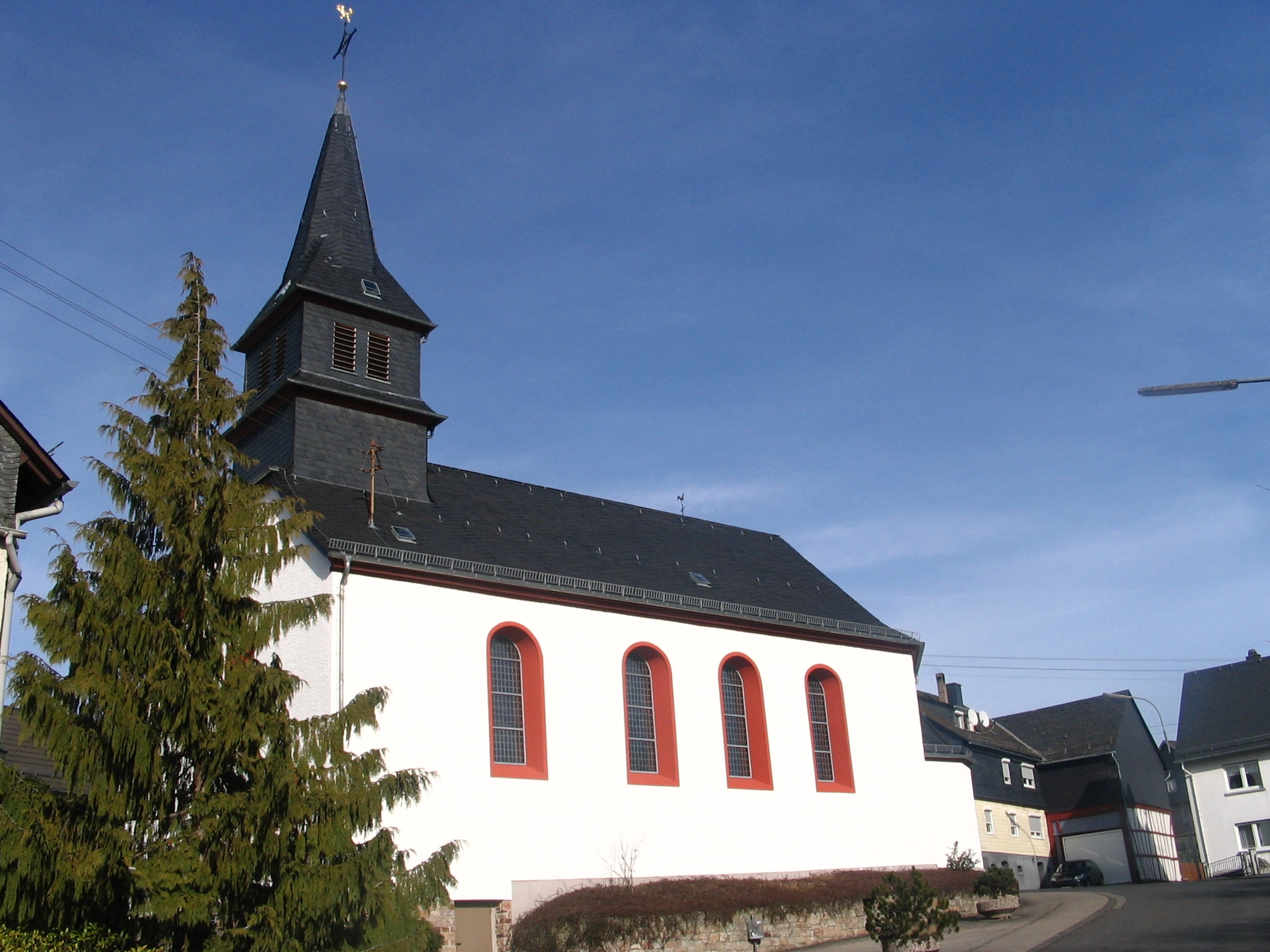 Kirche in Argentahl, Hunsrück